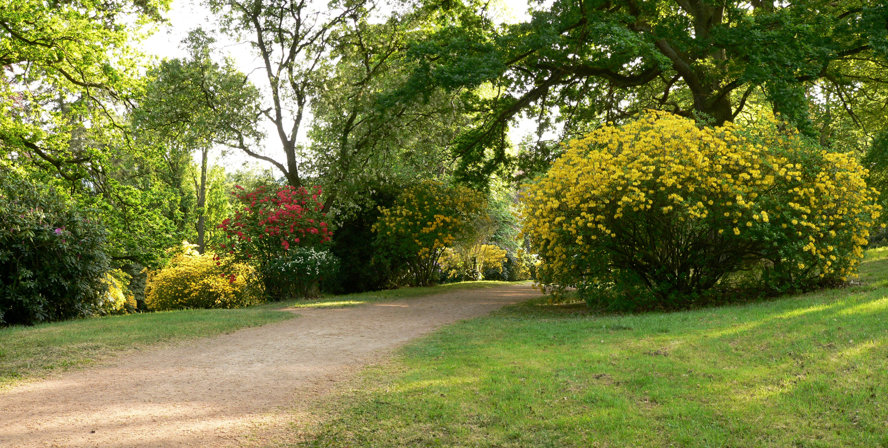 Ohrbergpark im Landschaftsschutzgebiet „Wesertal“